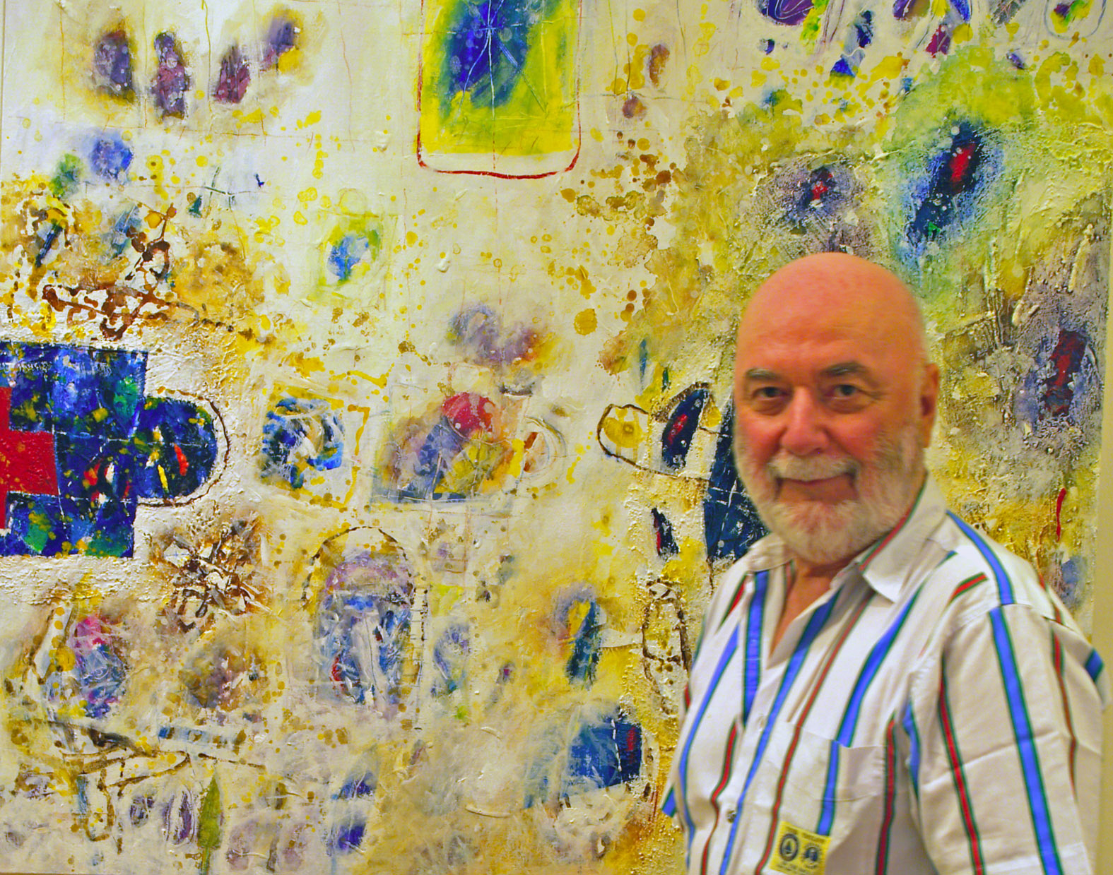 Matko Trebotić, slikar (Milna na Braču, 1935.)